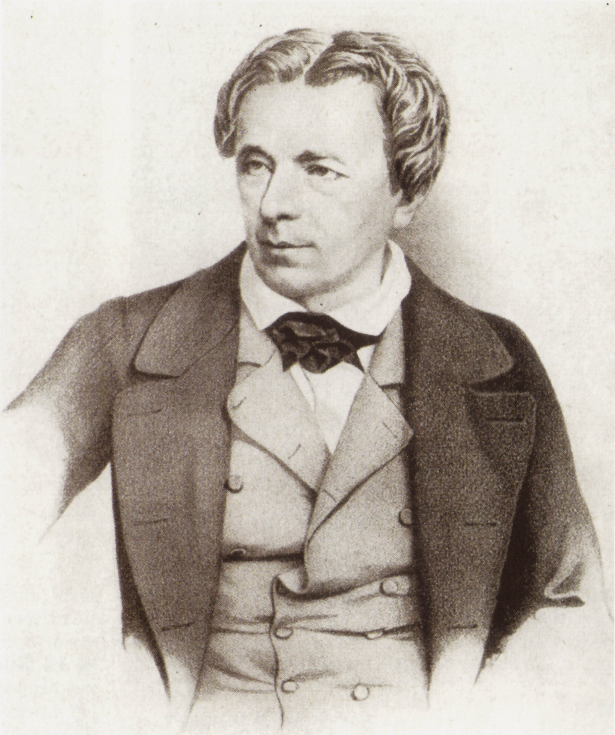 Friedrich Römer (1794–1864). Lithographie (HStAS J 300 Nr. 612)